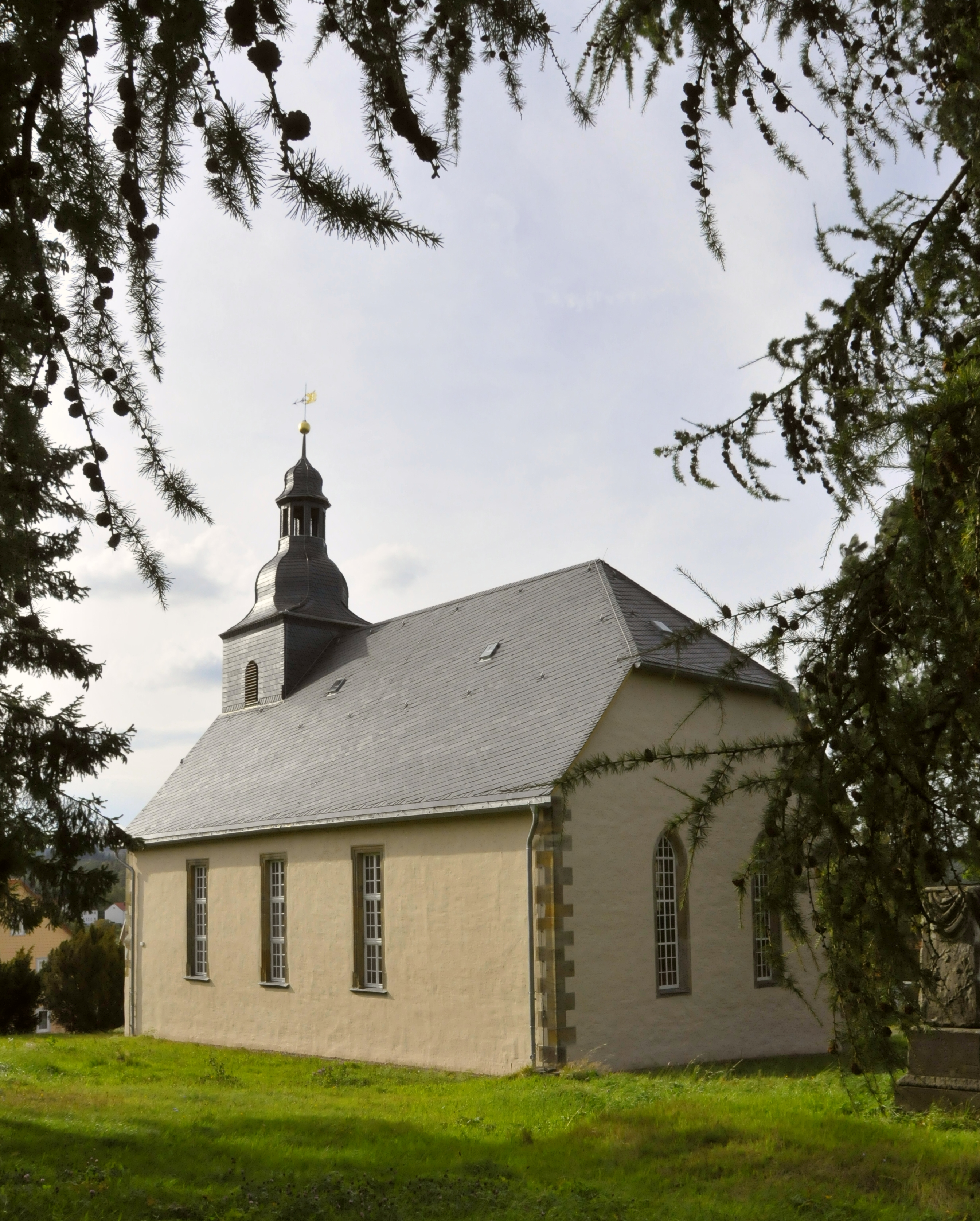 Tambach-Dietharz, Bergkirche